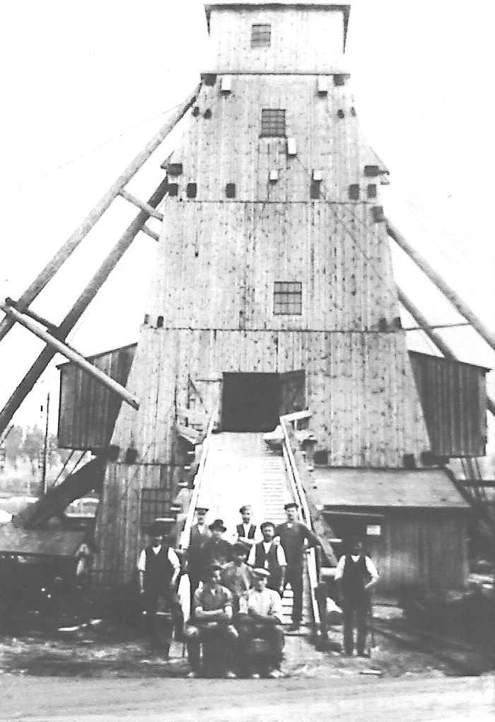 Teufmannschaft am Schacht Krügershall. Teutschenthal, Sachsen-Anhalt, Deutschland.